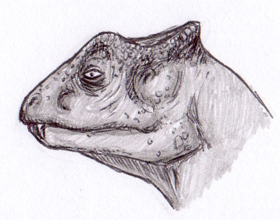 Yinlong